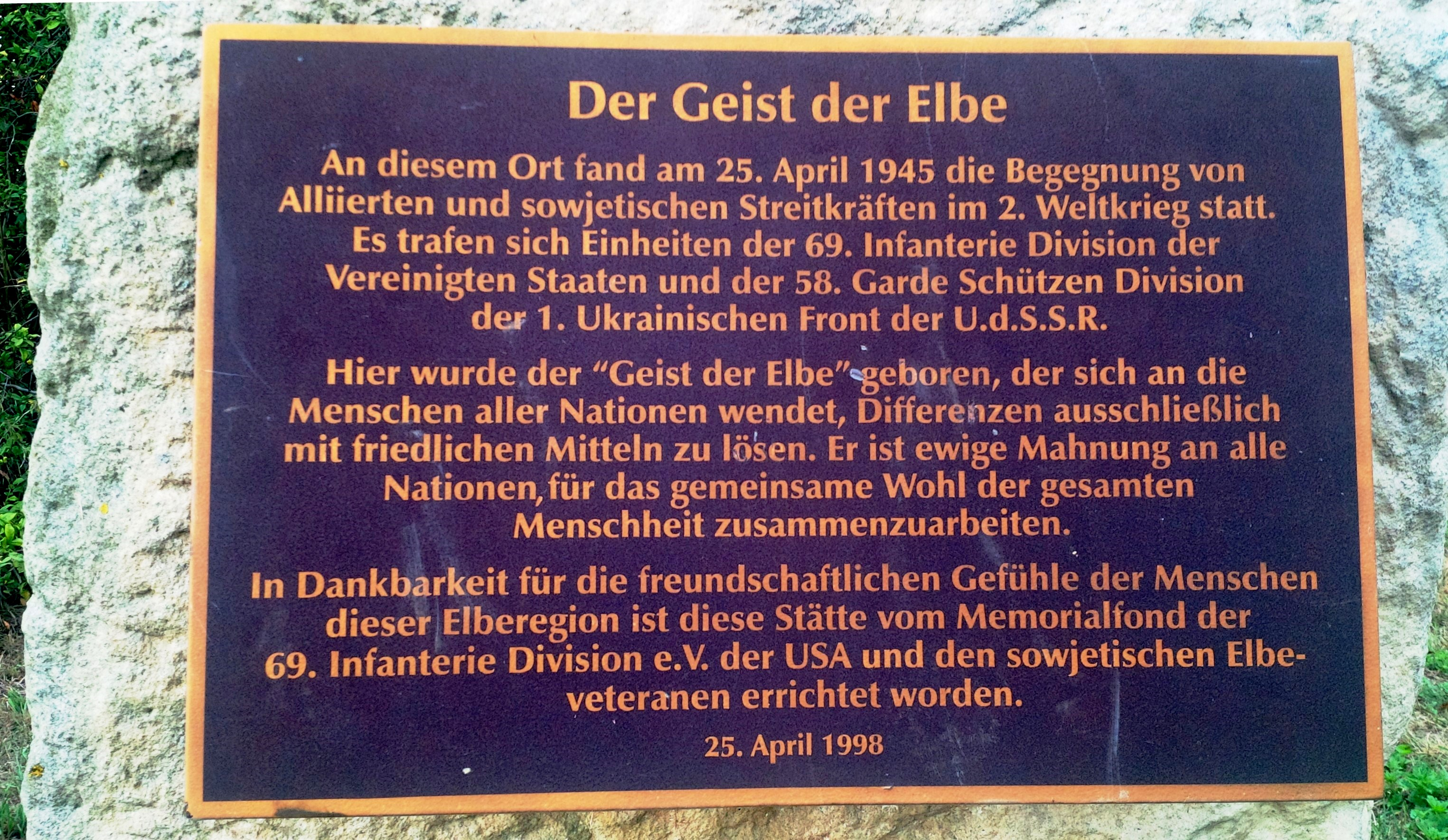 Gedenktafel zum Elbe Day Torgau